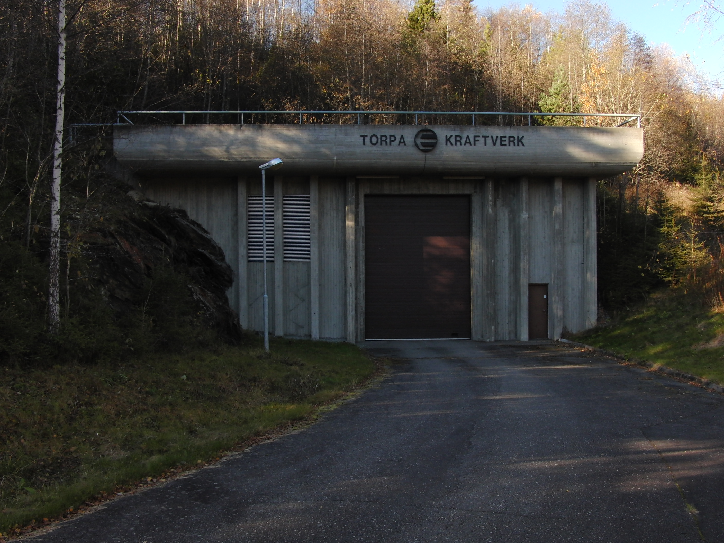 Torpa kraftverk